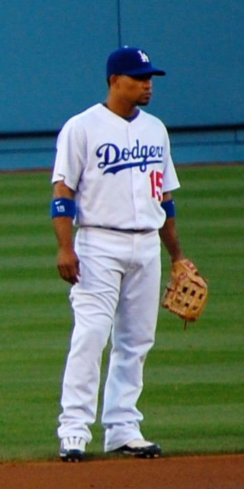 Rafael Furcal